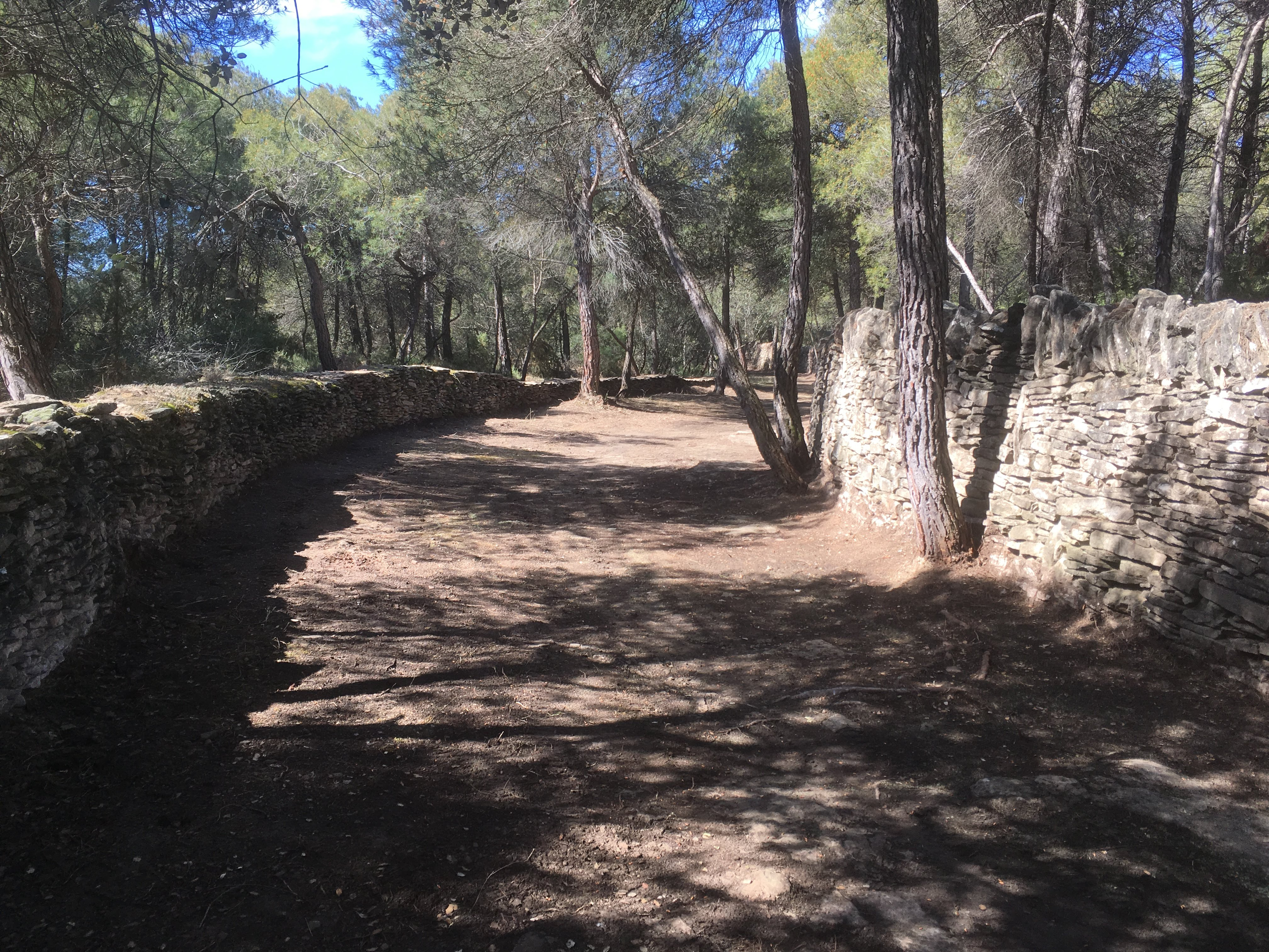 Camí ramader, parets de pedra seca Jaume Pont